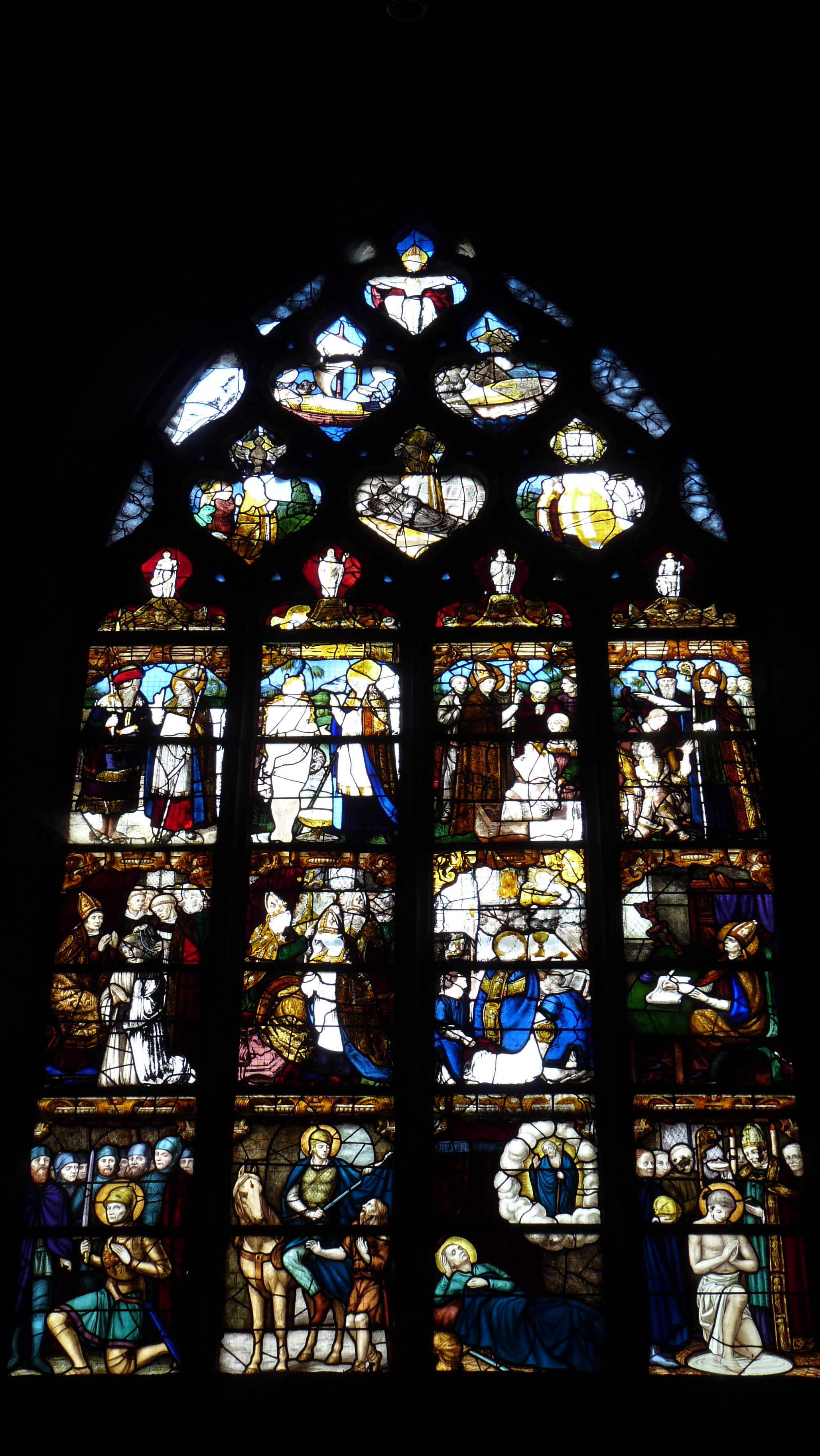 La légende de Saint-Martin. Baie 0 de l'église Saint-Martin-de-Tours de Romillé (35).